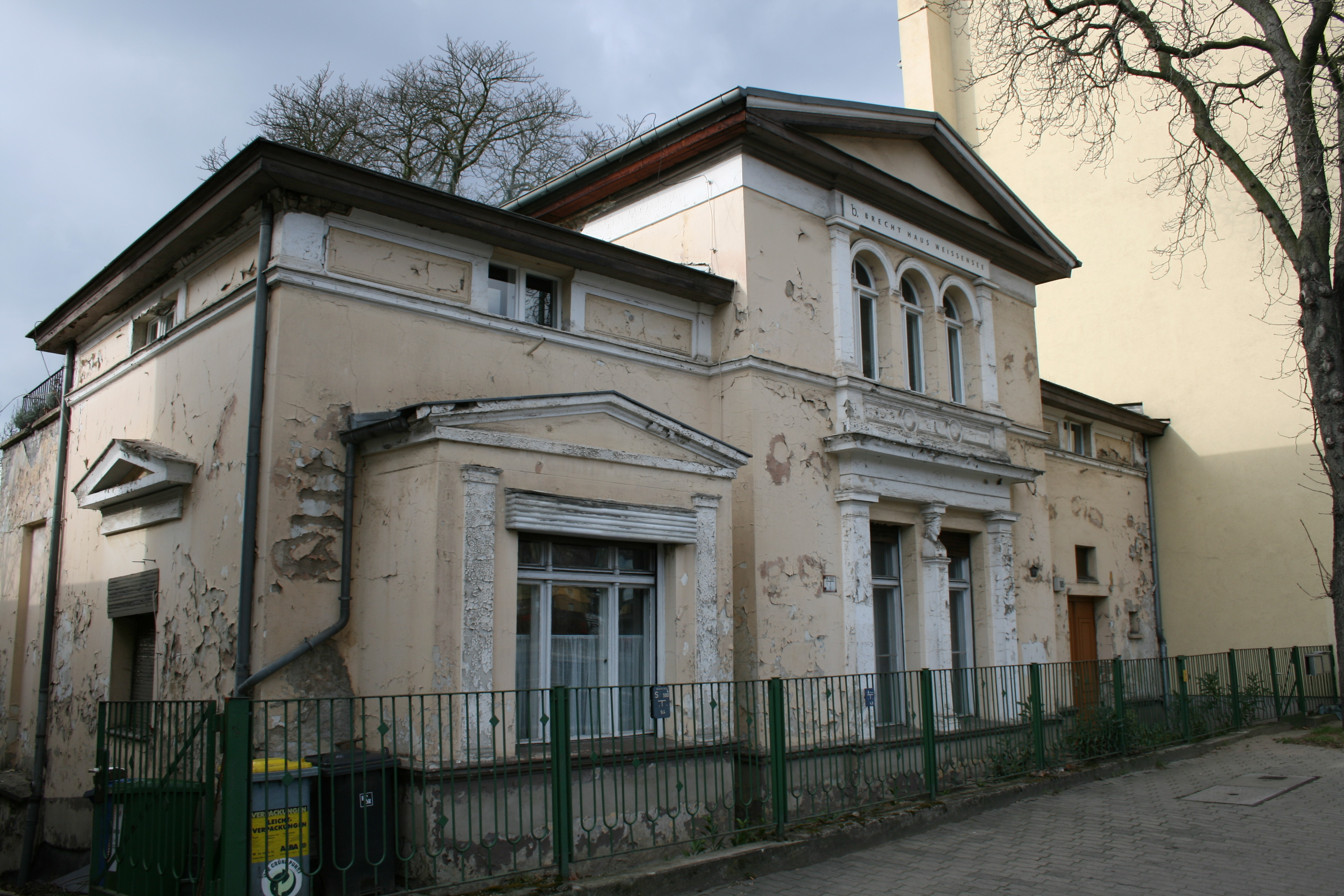 Brechthaus, Berliner Allee 185, Berlin